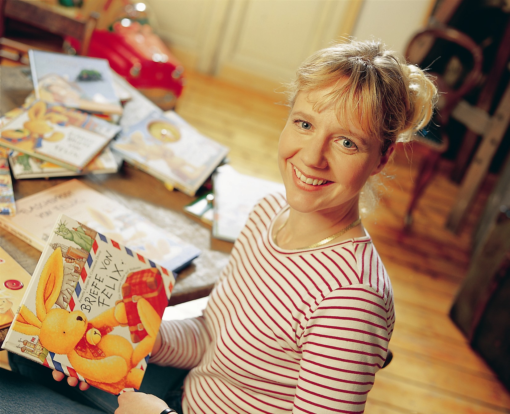 Annette Langen (* 1967), deutsche Kinder- und Jugendbuchautorin